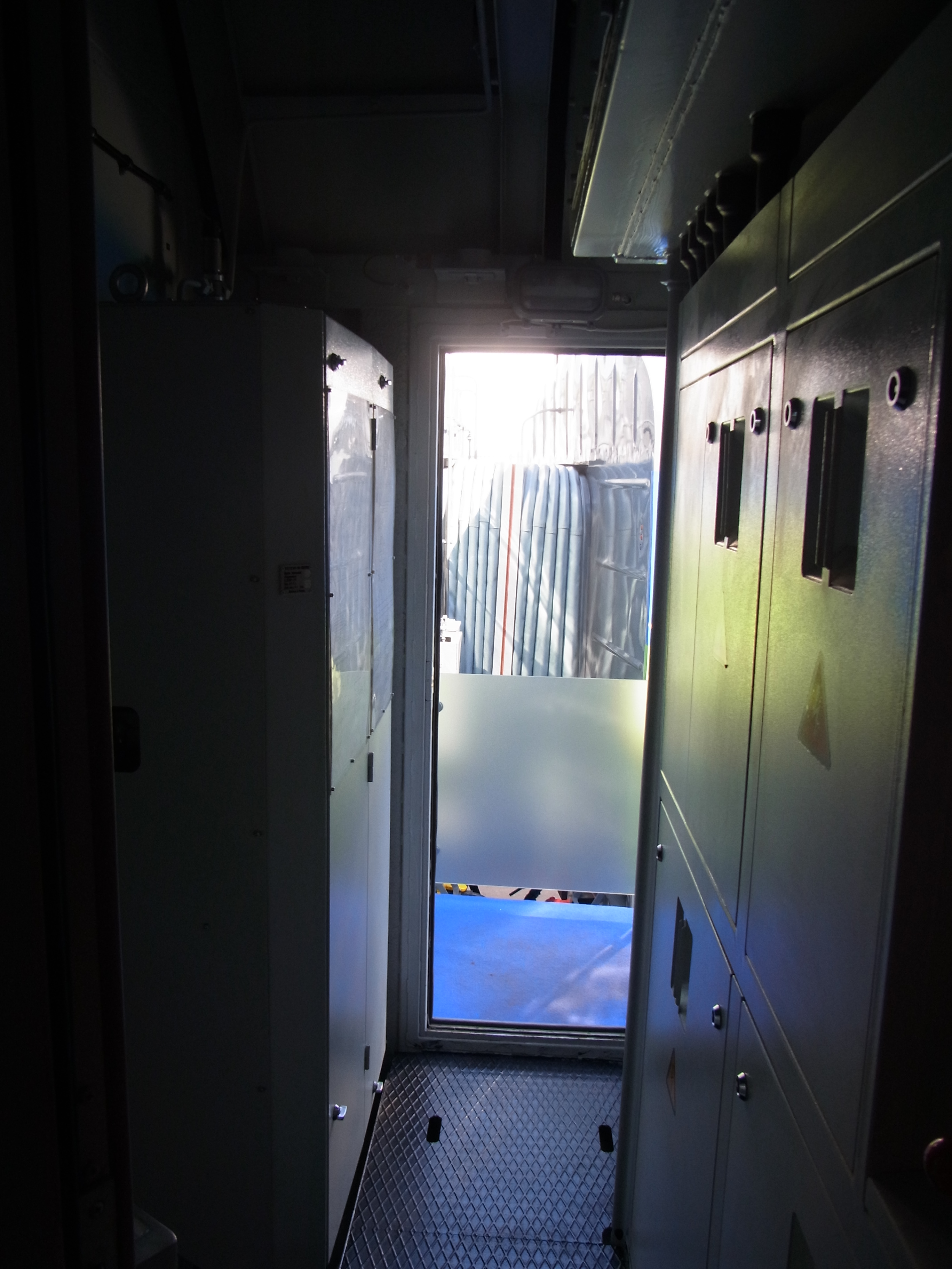 Тамбур тепловоза 3ТЭ25К2М-0001